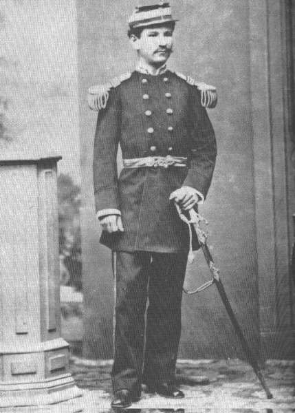 Coronel Alfonso Ugarte Vernal (1847 - 1880), Jefe de la Octava División del Ejército del Sur en la Batalla de Arica.